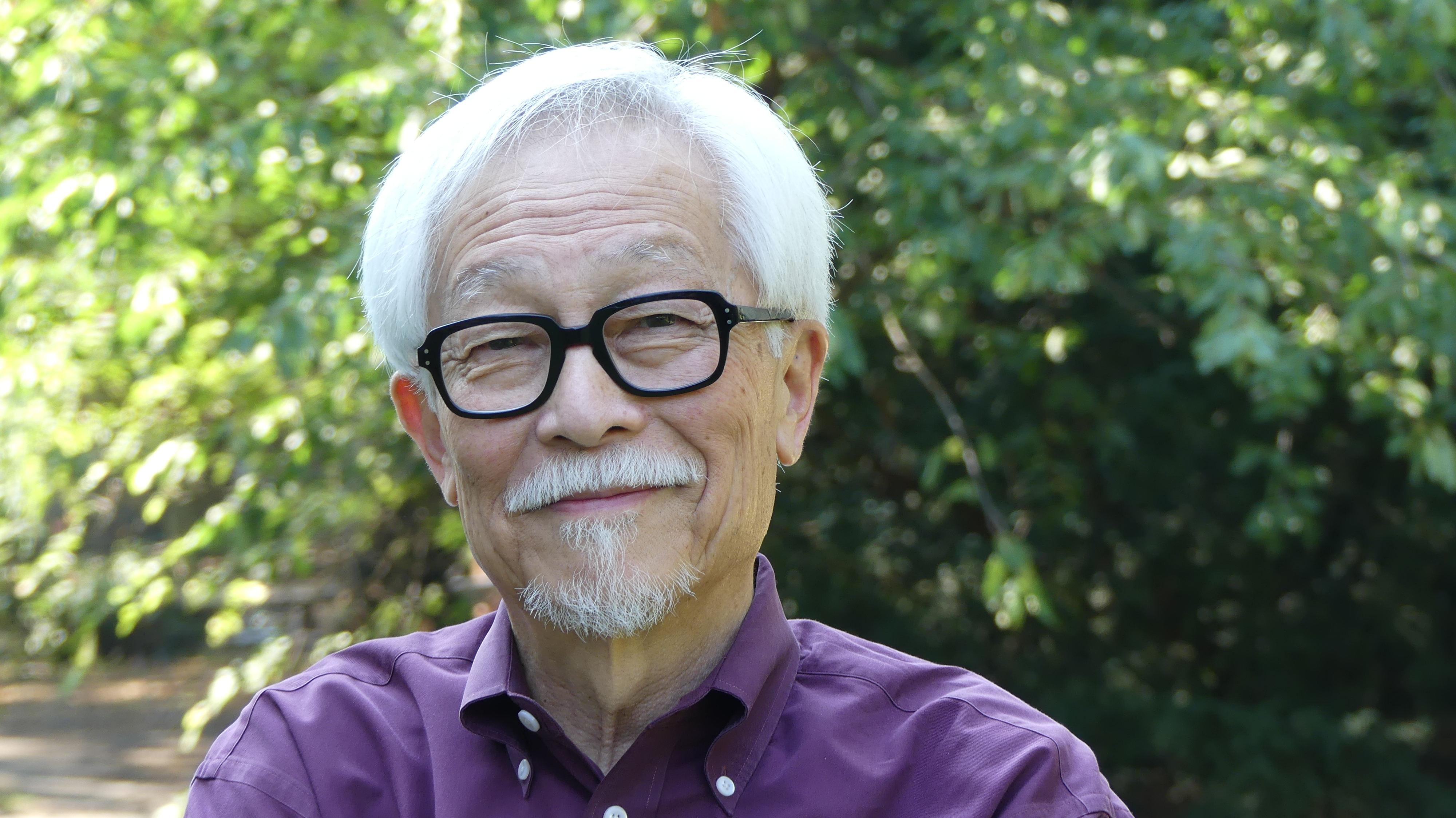 Allen Say in the garden of Haus der Berliner Festspiele during his participation at the section International Children´s and Young Adult Literature of the 16th international literature festival berlin on September 12, 2016